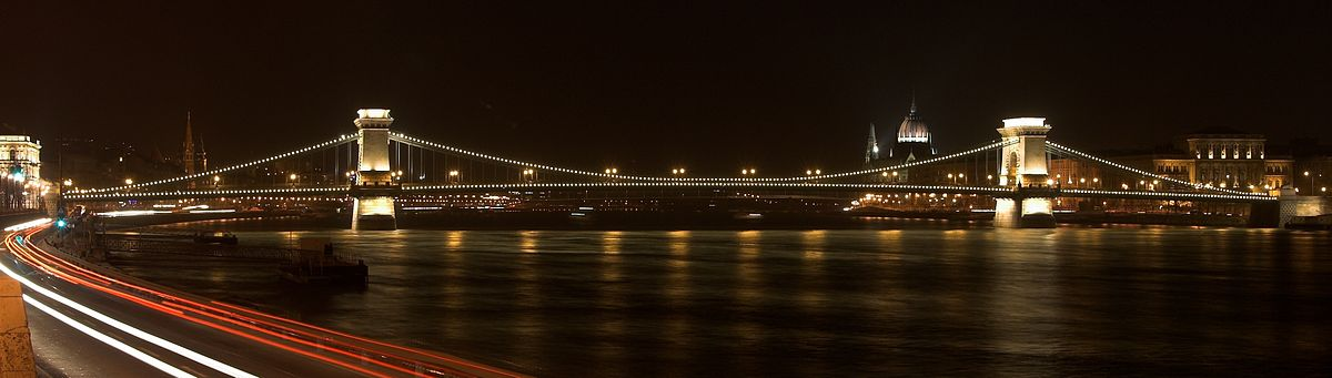 Széchenyi lánchíd éjszaka. Előtérben a Duna, háttérben a Parlament, jobbra a Magyar Tudományos Akadémia.